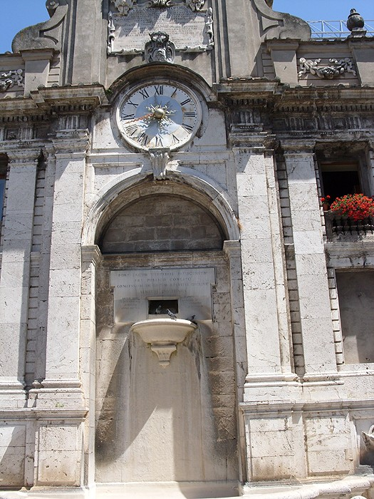 Spoleto - Fonte di Piazza